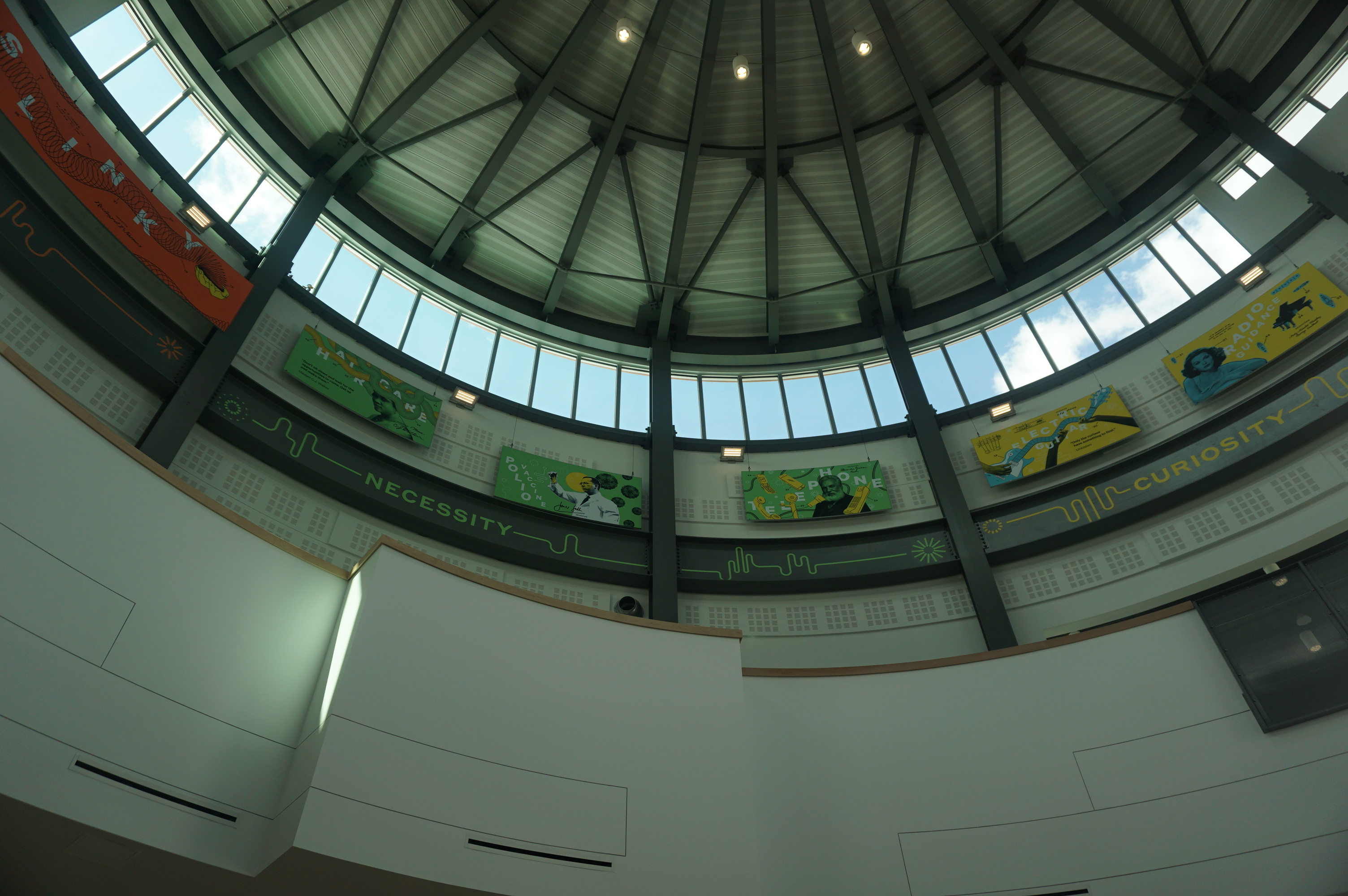 Gainesville_0064